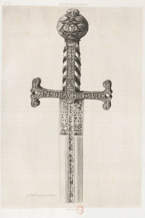 Epée de François 1er gravure de Jules Jacquemart dans "Les gemmes et joyaux de la couronne"